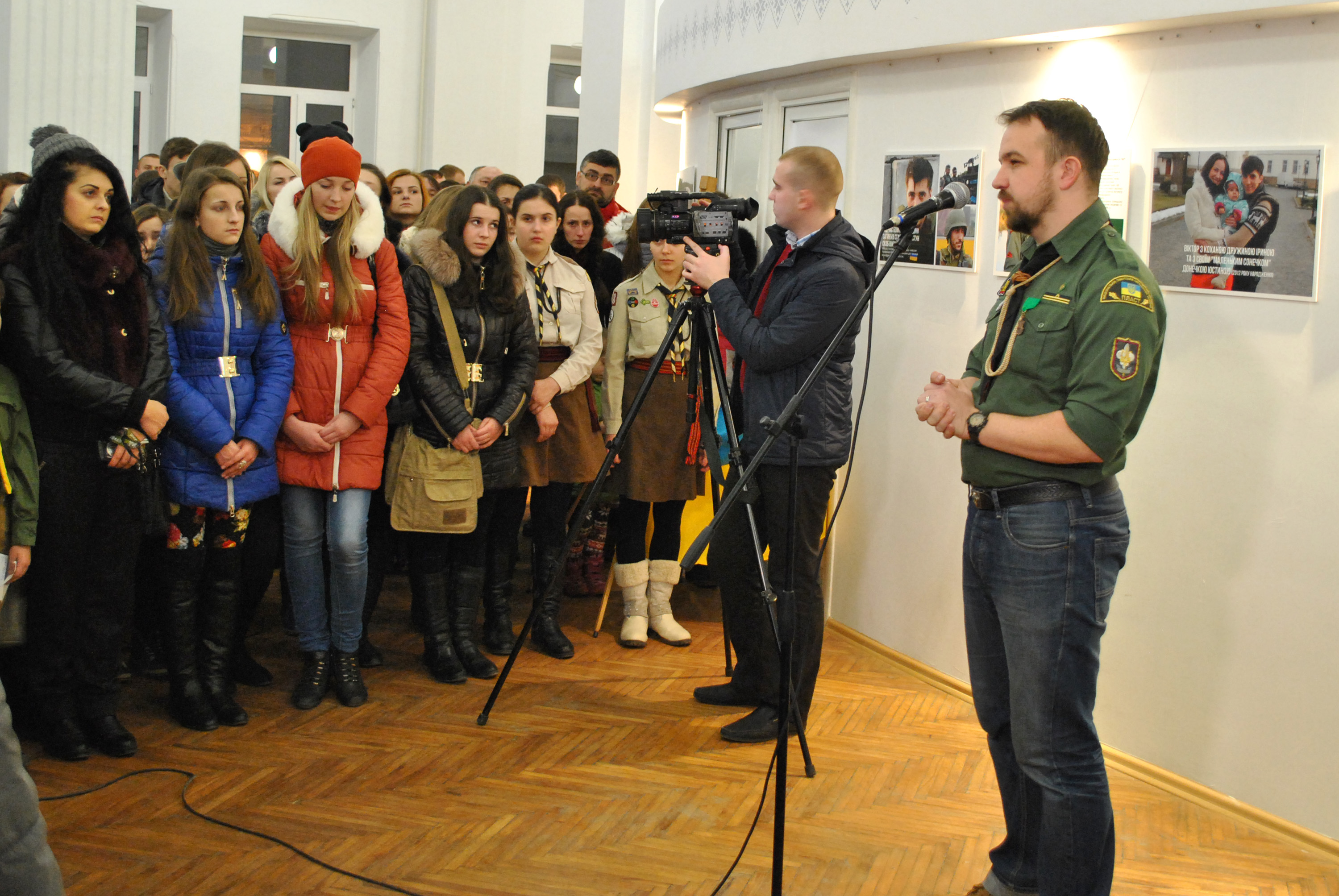 2 лютого 2015 року в Українському Домі «Перемога» в м. Тернопіль відкрито фотовиставку Віктора Гурняка «Від Майдану до Війни». Друг Віктора Гурняка Назар Зелінка відкриває виставку.